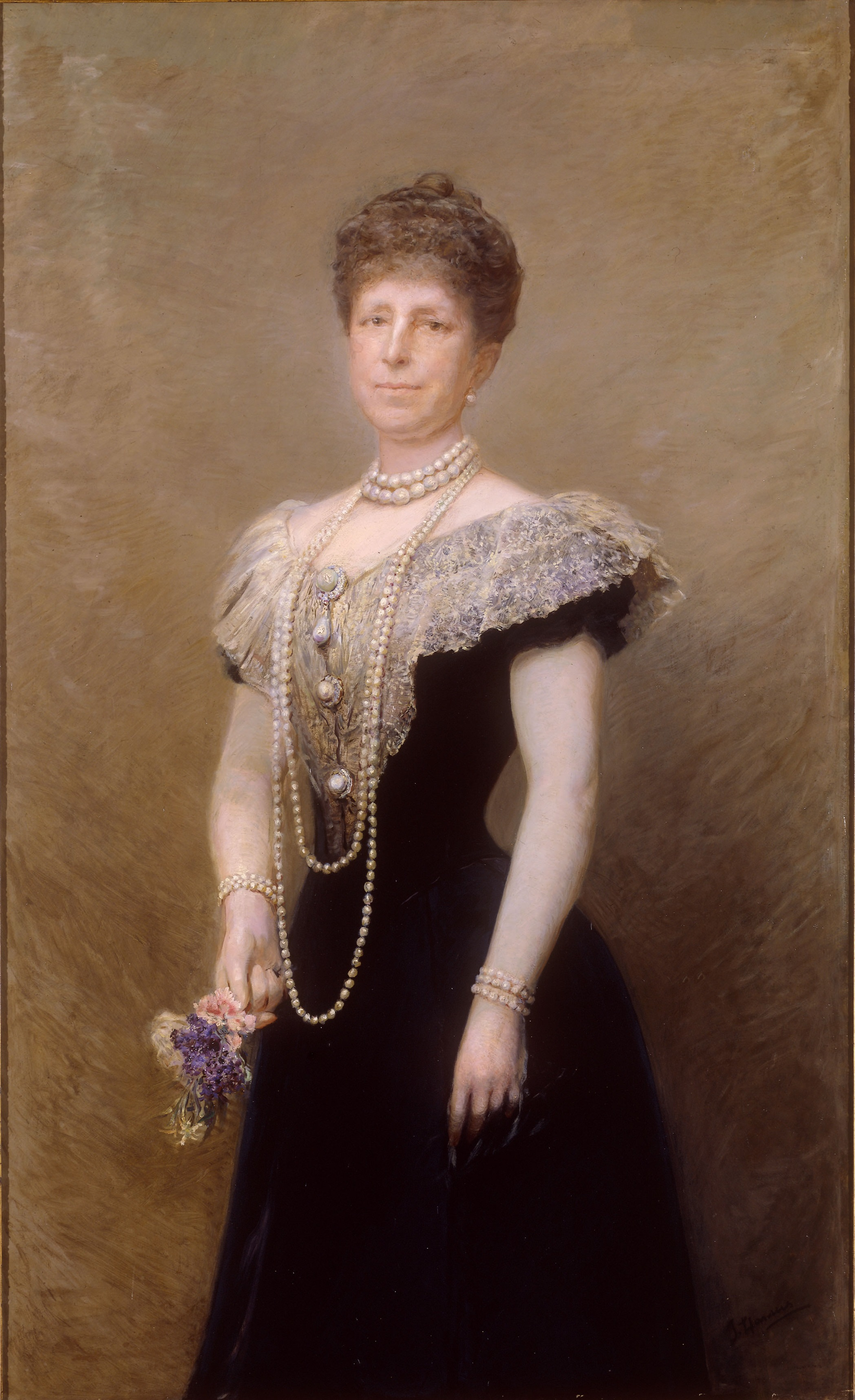 Retrato de la reina María Cristina de Habsburgo-Lorena (1858-1929), que fue esposa del rey Alfonso XII de España y madre del rey Alfonso XIII de España.